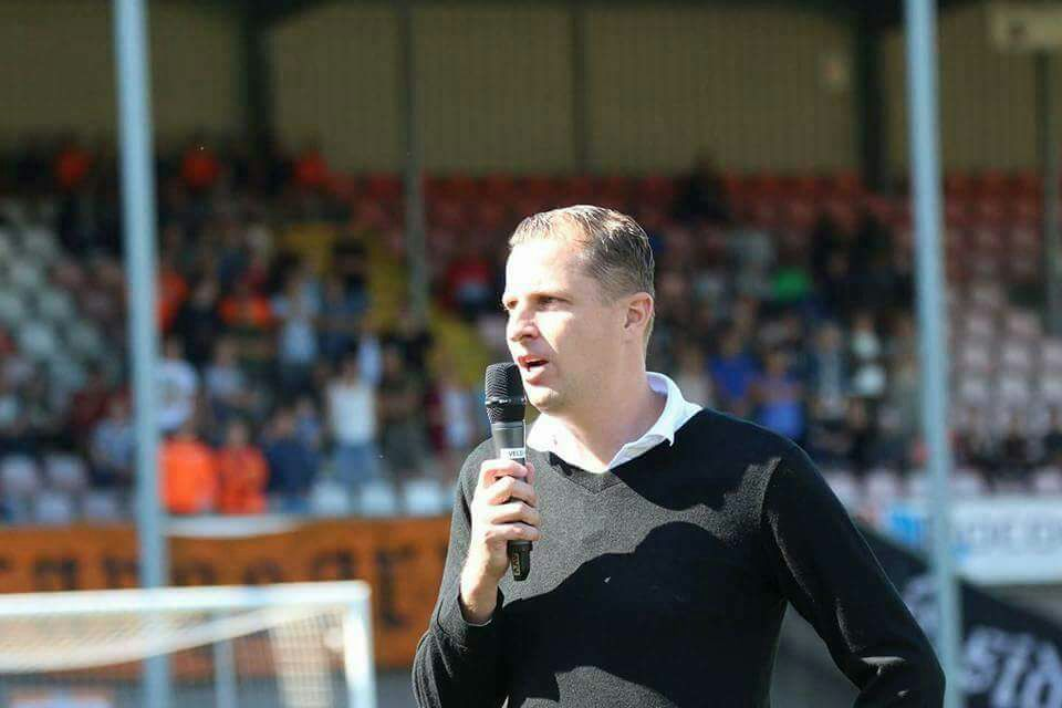 Fotograaf: Frank Fotograaf Brussel / PéSide